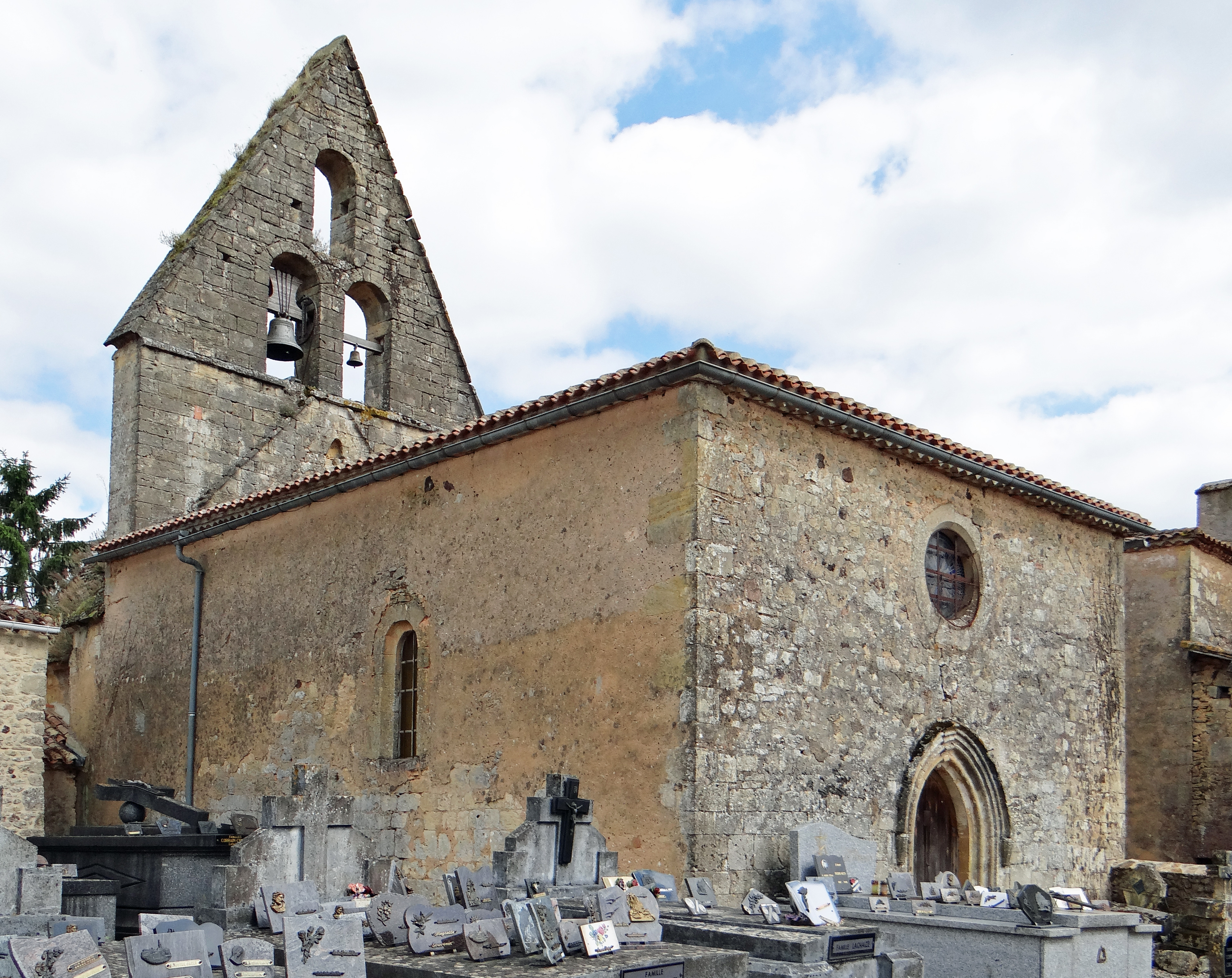 Soulaures - Église Saint-Martial